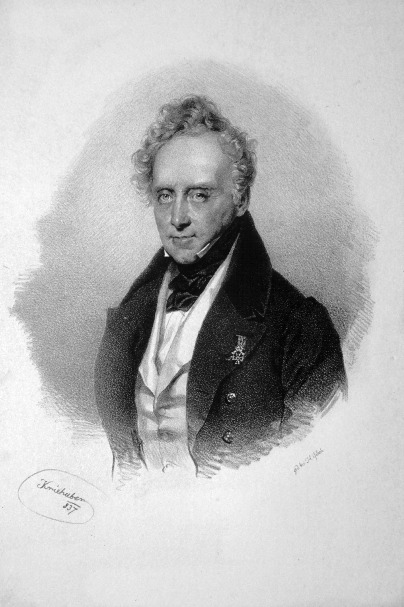 Philipp Batthyany-Strattmann (1781-1870), Fürst, Geheimrat Lithographie von Josef Kriehuber, 1837